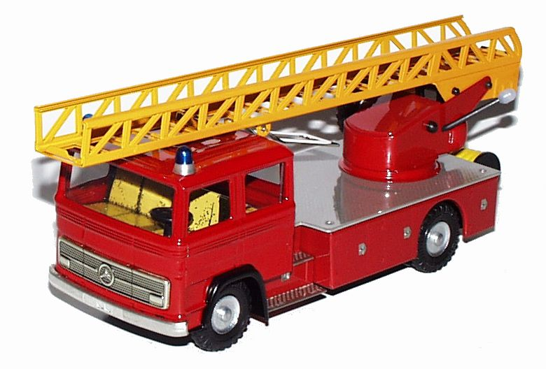 KOVAP Feuerwehr ehem. Kellermann CKO Modell